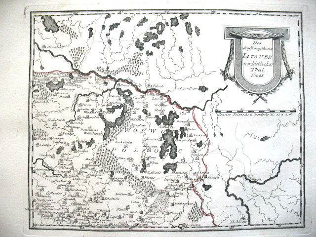 Des Großherzogthums Litauen nordöstlicher Theil. Nro. 48. Kolorierter Kupferstich